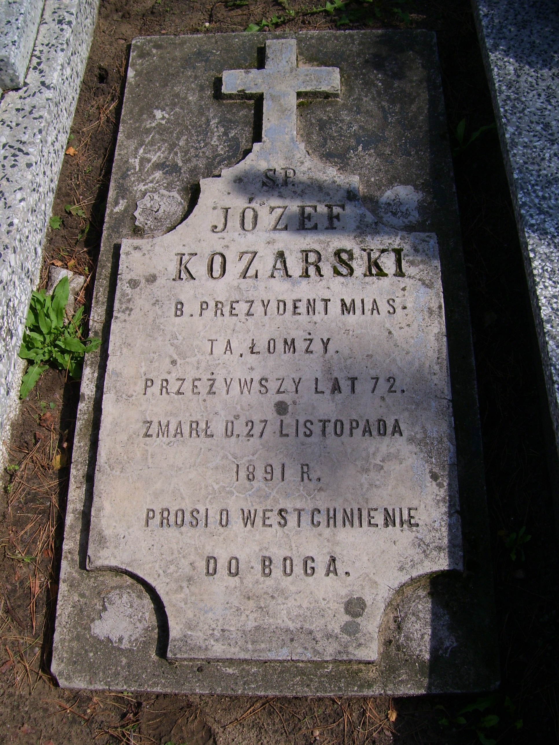 Grób Józefa Kozarskiego, b. prezydenta Łomży na cmentarzu w Stoczku Łukowskim